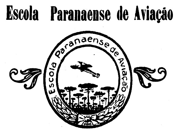 Logo da extinta Escola Paranaense de Aviação.